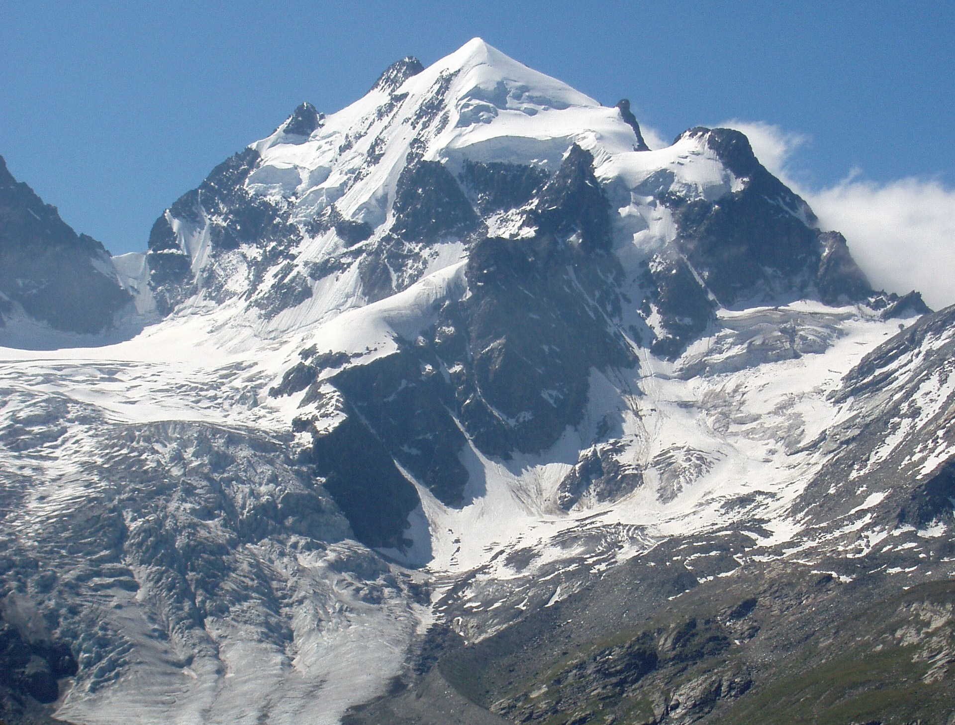 Il Piz Roseg